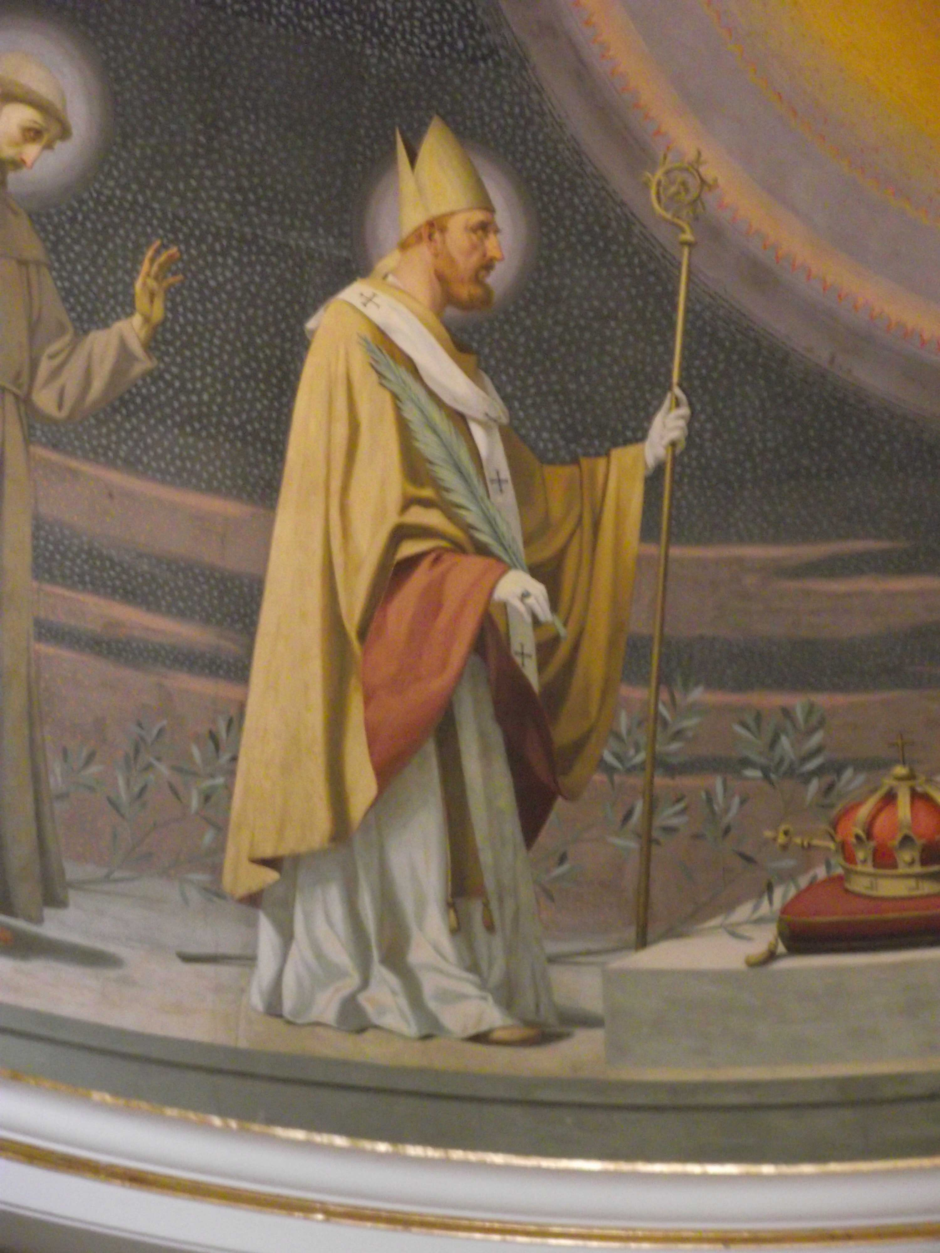 Jesi, Duomo, San Settimio affresco di Biagio Bigatti, 1937